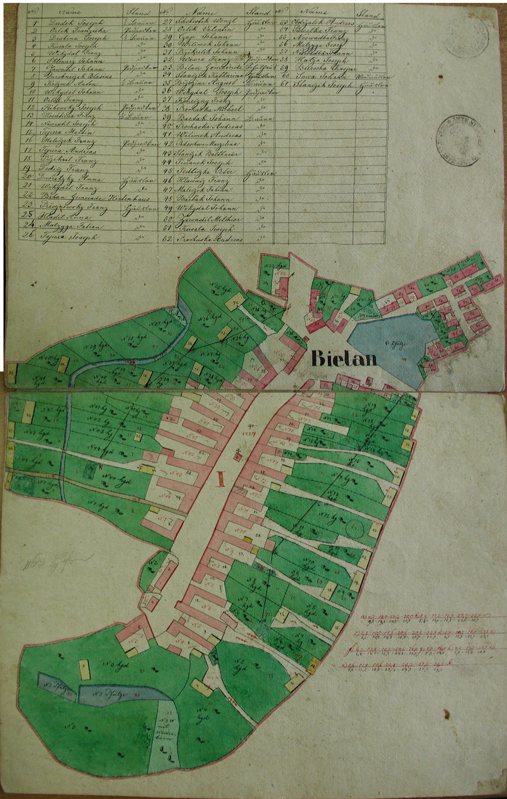 Výřez indikační skici Stabilního katastru zachycuje intravilán obce Bílany před rekem 1830. Mapa je uložena v Moravském zemském archívu v Brně.